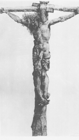 Christus am Kreuz, Kohle, Tinte und Papier, 53,1 x 32 cm, Staat. Kunsthalle, Karlsruhe